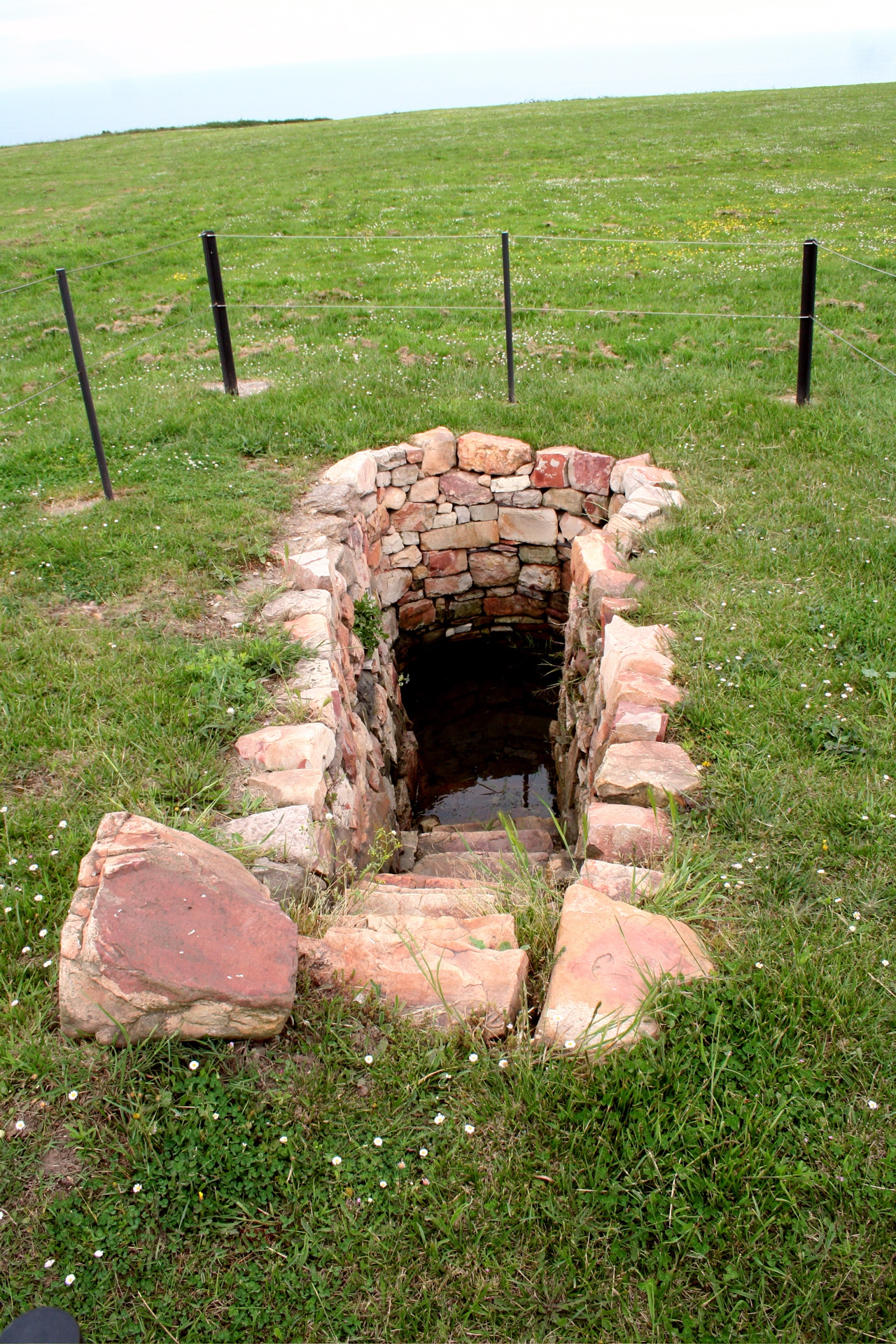 Pozo de abastecimiento de agua poblado Campa Torres